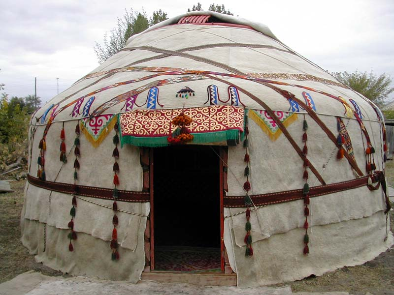 Forrás